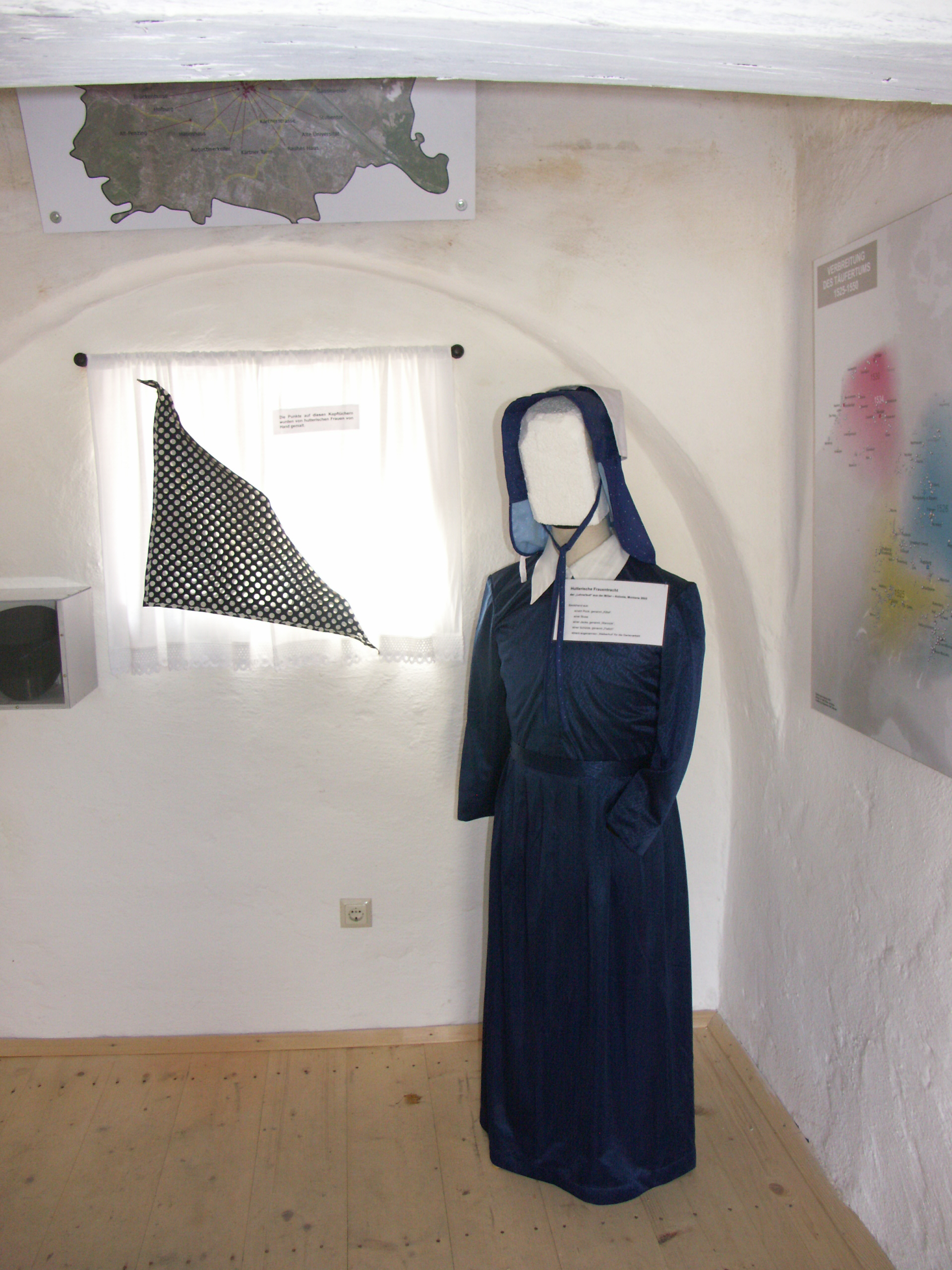 Im Täufermuseum ist die klassiche Tracht zu sehen, die von den Frauen der Hutterer bis heute getragen wird: Rock, Bluse und Haube, in gedeckten Farben.